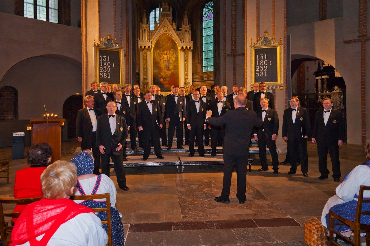 Viipurin Lauluveikot